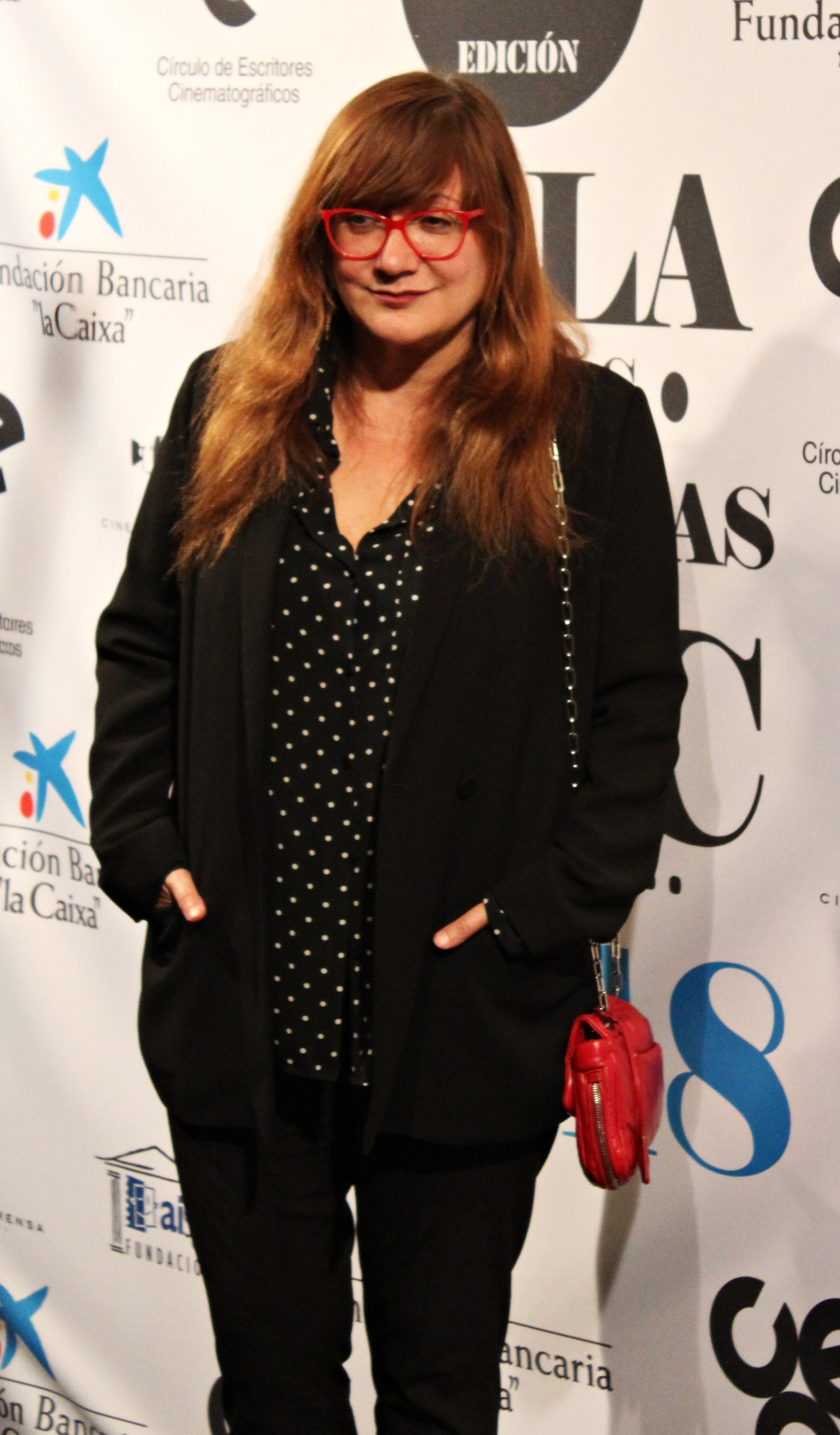 La cineasta española Isabel Coixet en la 73 edición de las Medallas del Círculo de Escritores Cinematográficos.